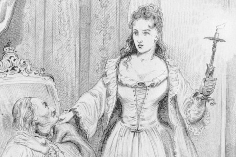 Die Weiße Frau erscheint König Friedrich I. 1713 kurz vor seinem Tod. Lithographie von Ludwig Löffler, 1851.